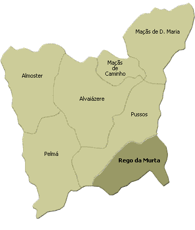 localisation de rego da murta sur la freguesia de alvaiazere